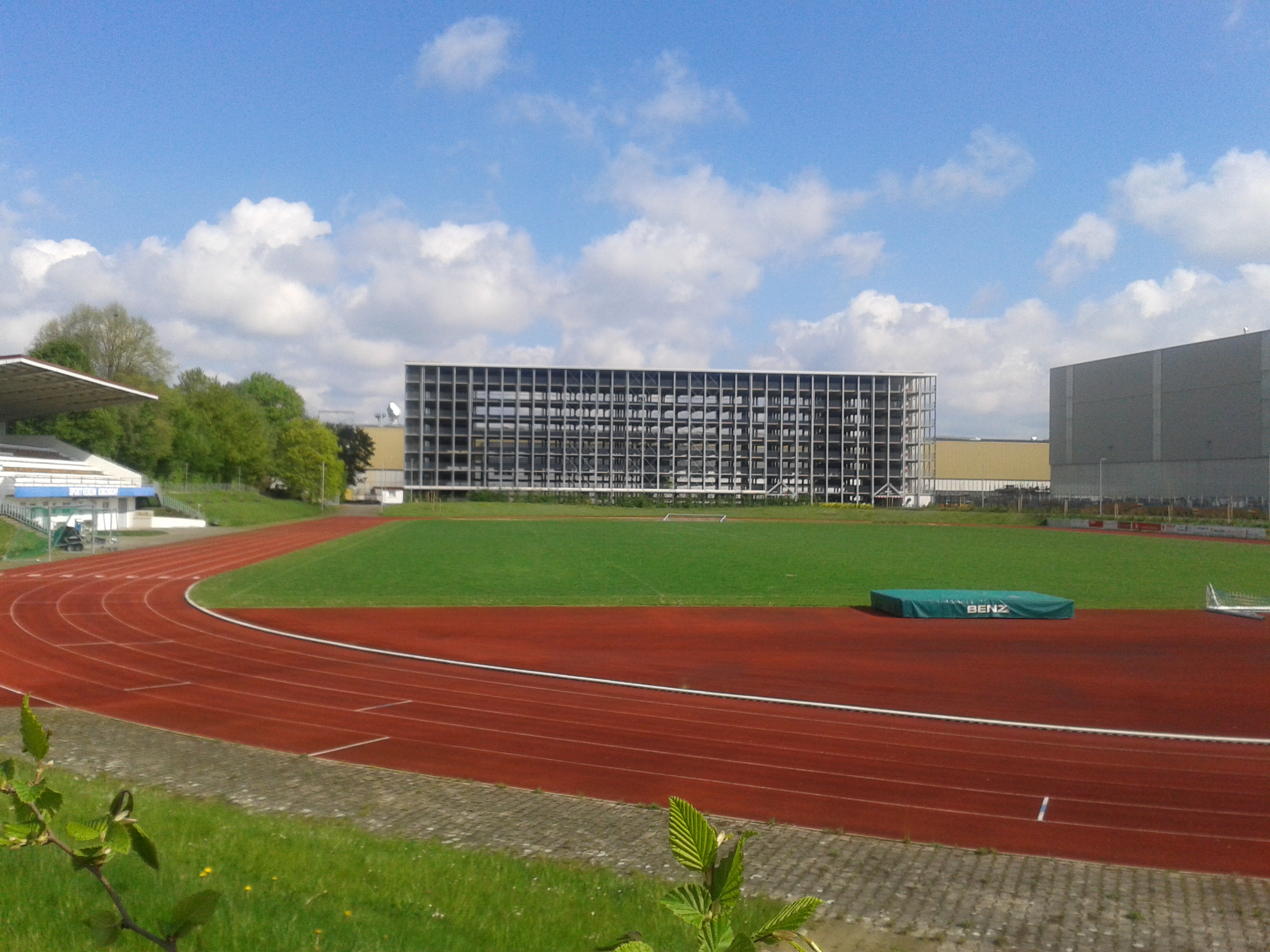 Neues Parkhaus für Mitarbeiter der Liebherr Hydraulikbagger - Dr. Hans-Liebherr-Stadion Kirchdorf